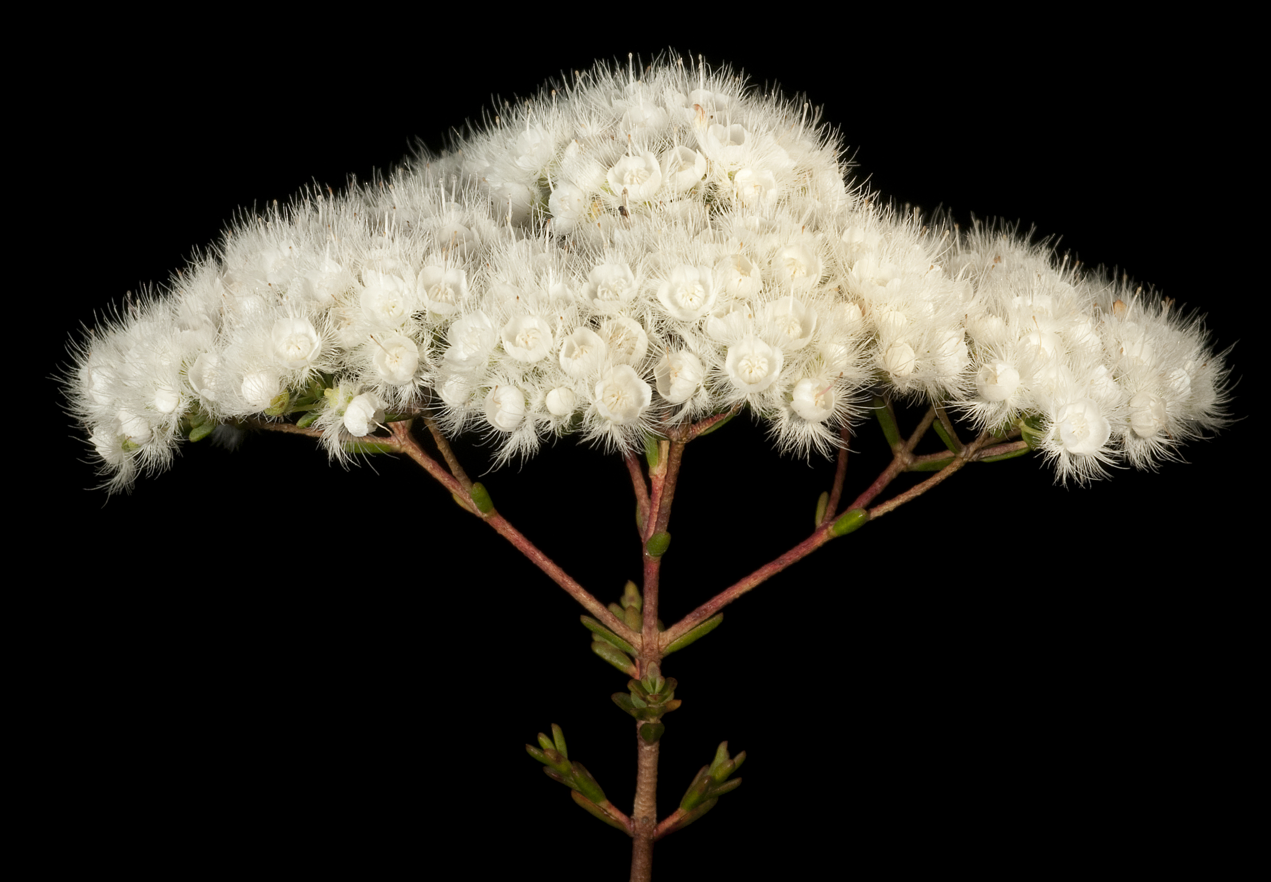 Frank Hann NP